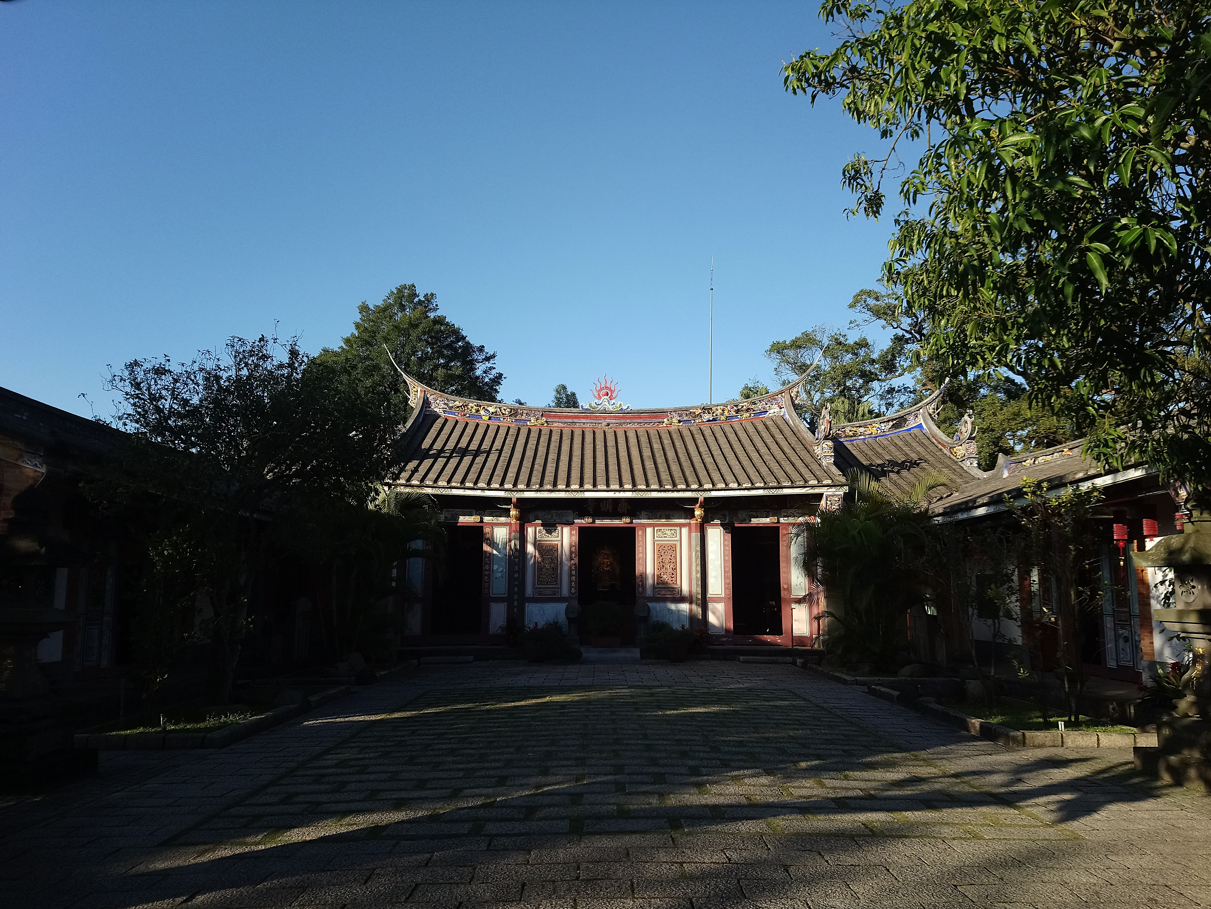 大溪齋明寺遠景,桃園市大溪區光明里